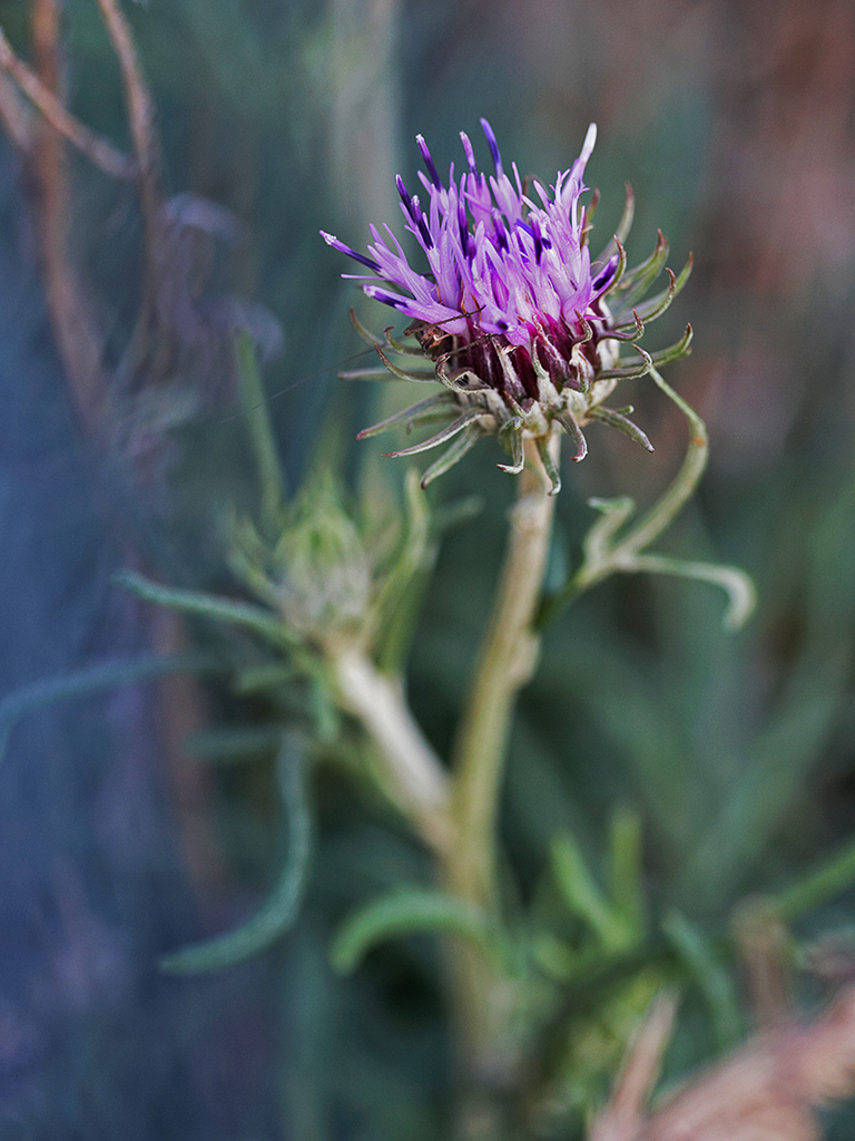 Jurinea cyanoides, Sand-Silberscharte - Blüte